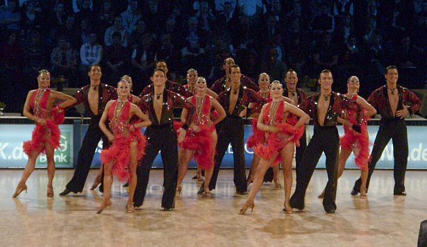 Lateinformation des Grün-Gold-Club Bremen (A-Team) bei der Deutschen Meisterschaft der Formationen 2009